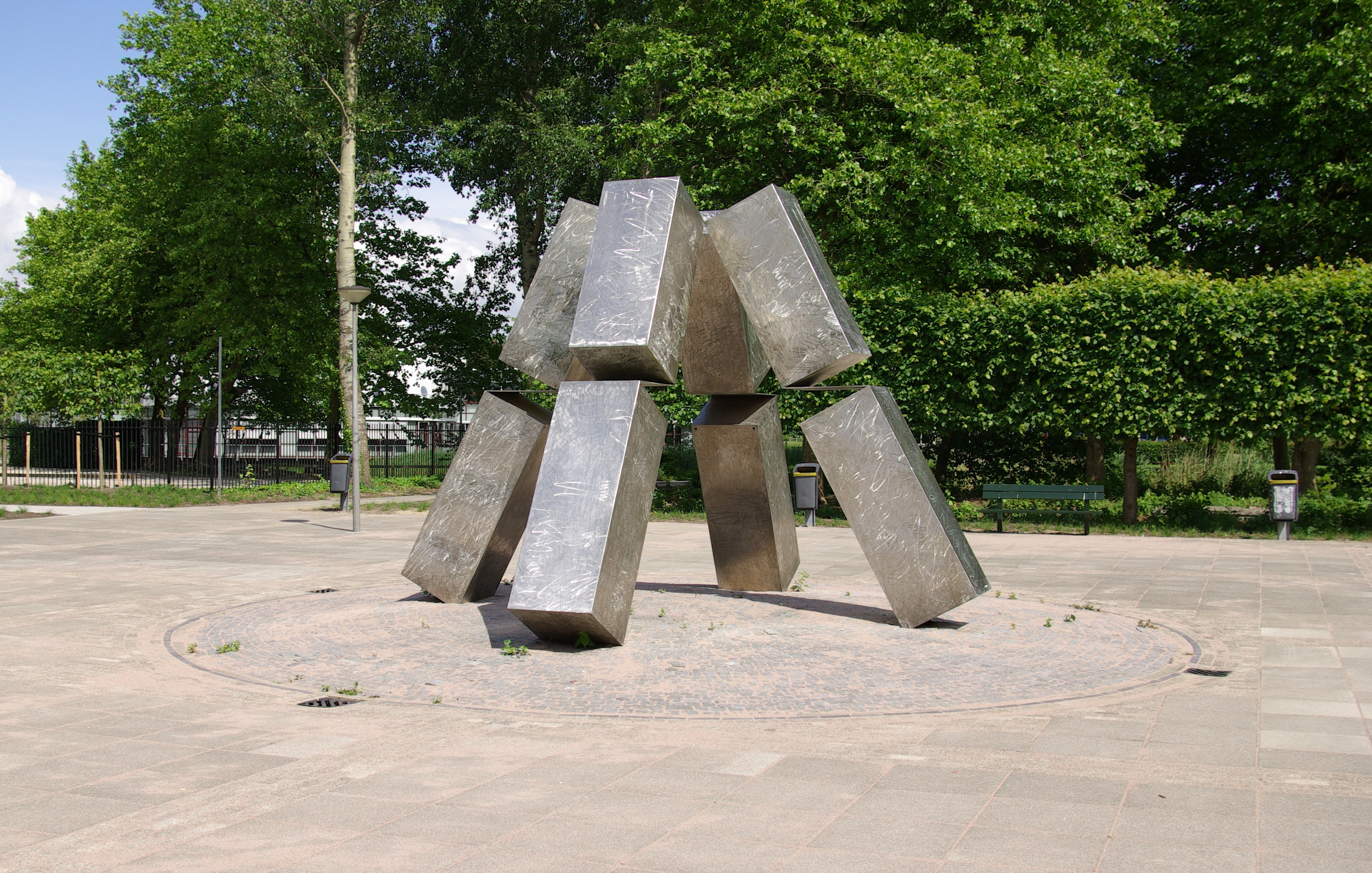 Gaasperpark in Amsterdam Zuidoost Piramide, Jan Goossen